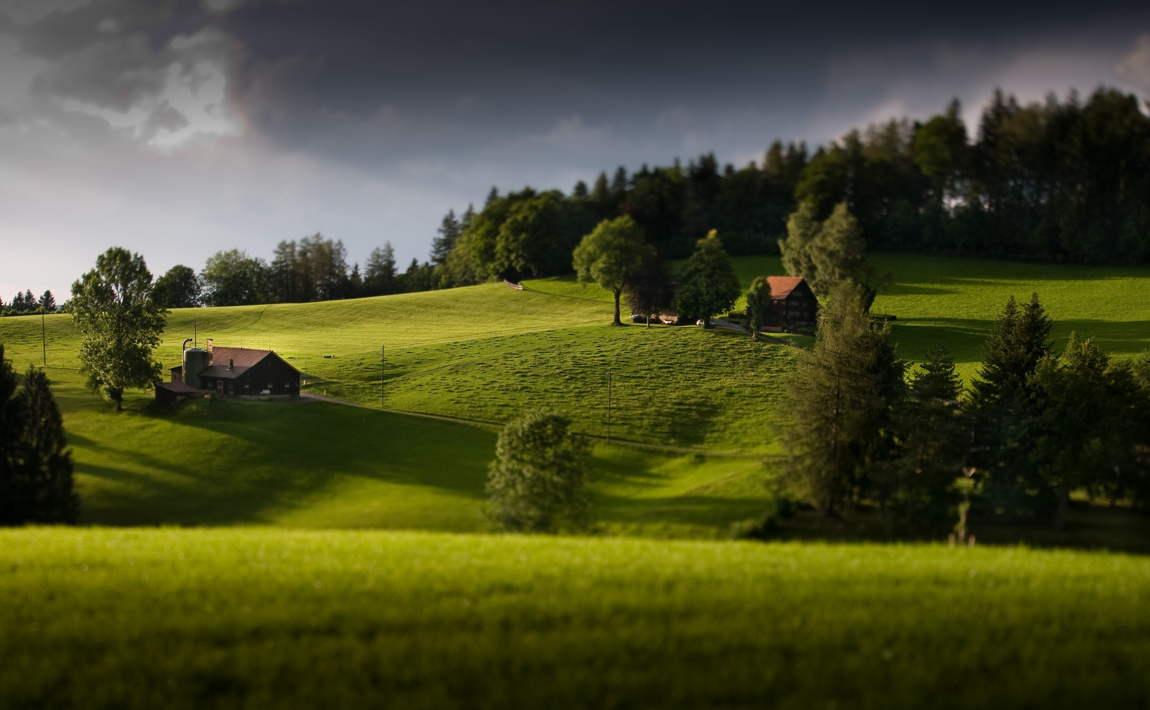 minutes after a rainfall in Teufen, Appenzell